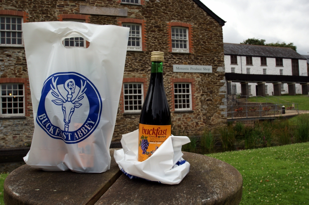 011 Buckfast Abbey